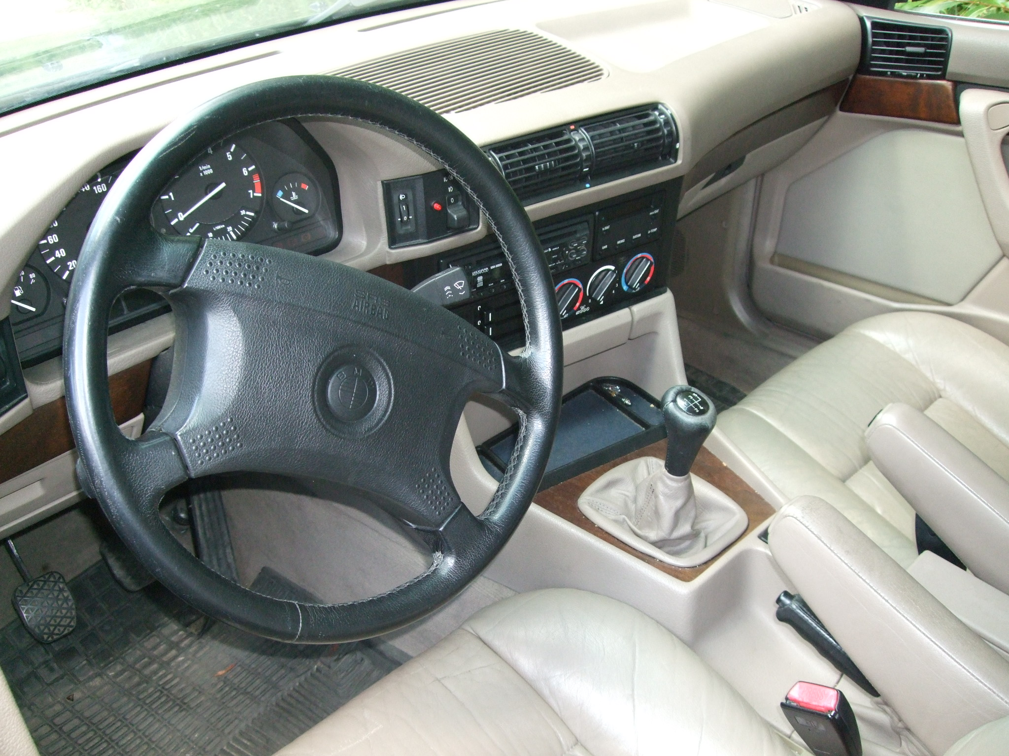 BMW 530i e34 V8. Wnętrze.